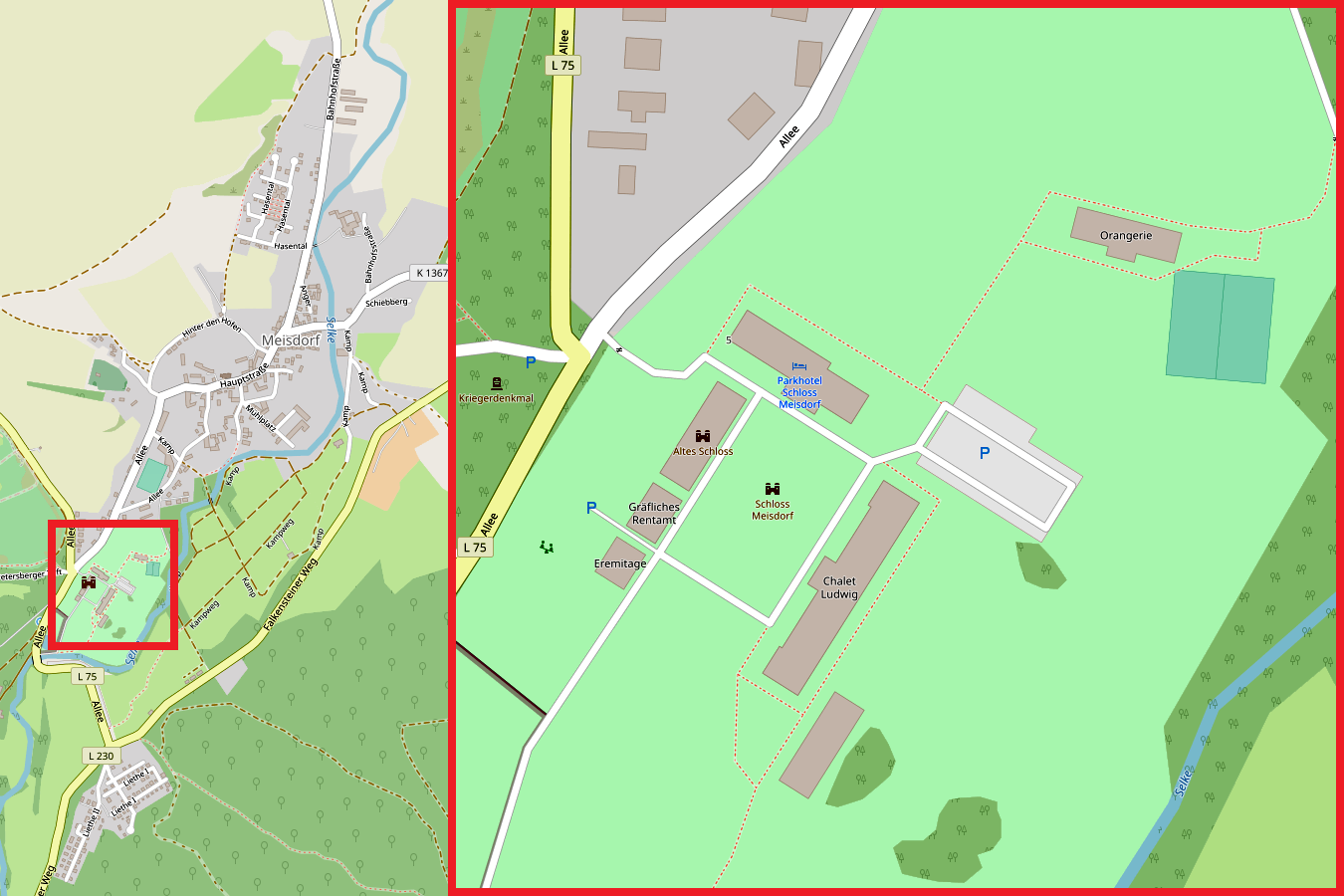 Rechts: Lageplan der Gebäude von Schloss Meisdorf in Meisdorf / Harz, Links: die Lage des Schlosses im Ort Meisdorf, Ortsteil von Falkenstein This map may be incomplete, and may contain errors. Don't rely solely on it for navigation.